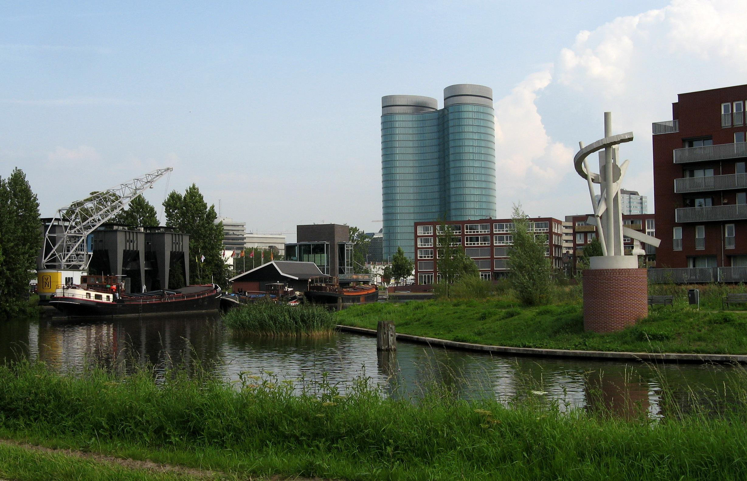 Zicht op de Veilinghaven in Utrecht vanuit het westen.